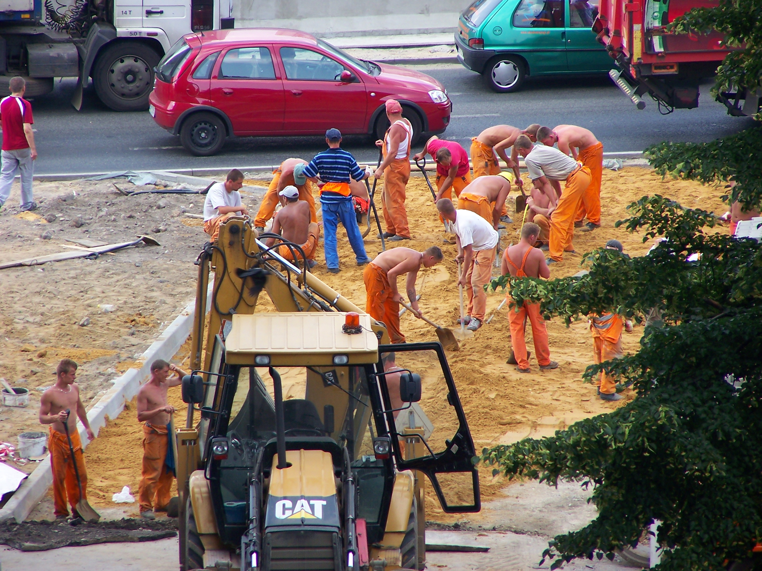 Roboty drogowe przy drodze łączącej parking z DTŚ w Katowicach (uploaded also for fun).